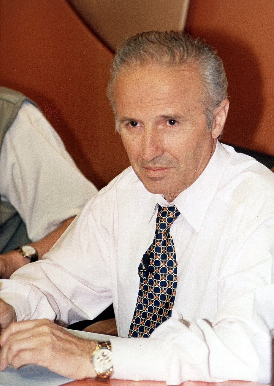 Dumitru Tinu, Bucuresti